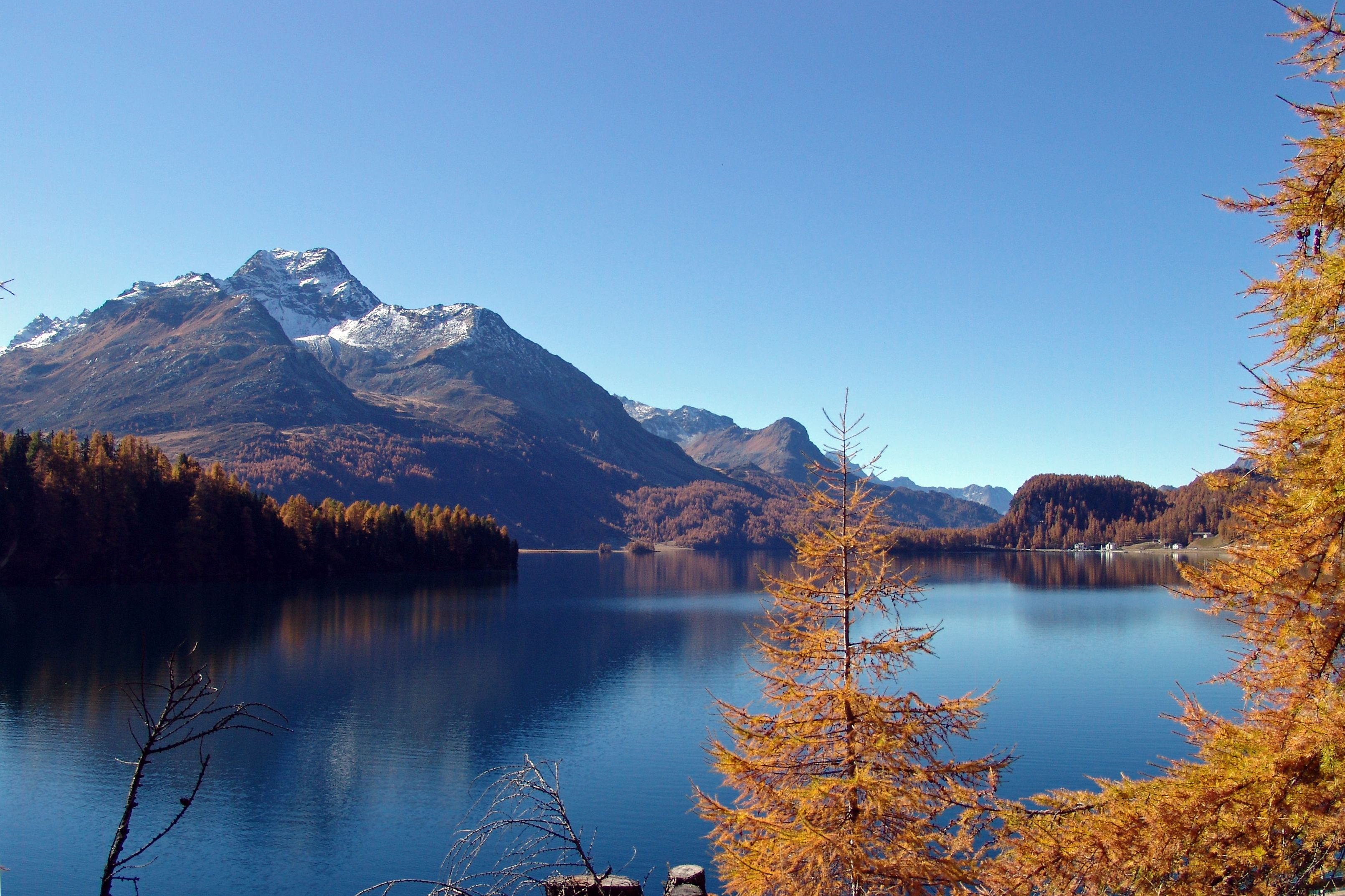 Silsersee im Oberengadin, Blick Richtung Maloya